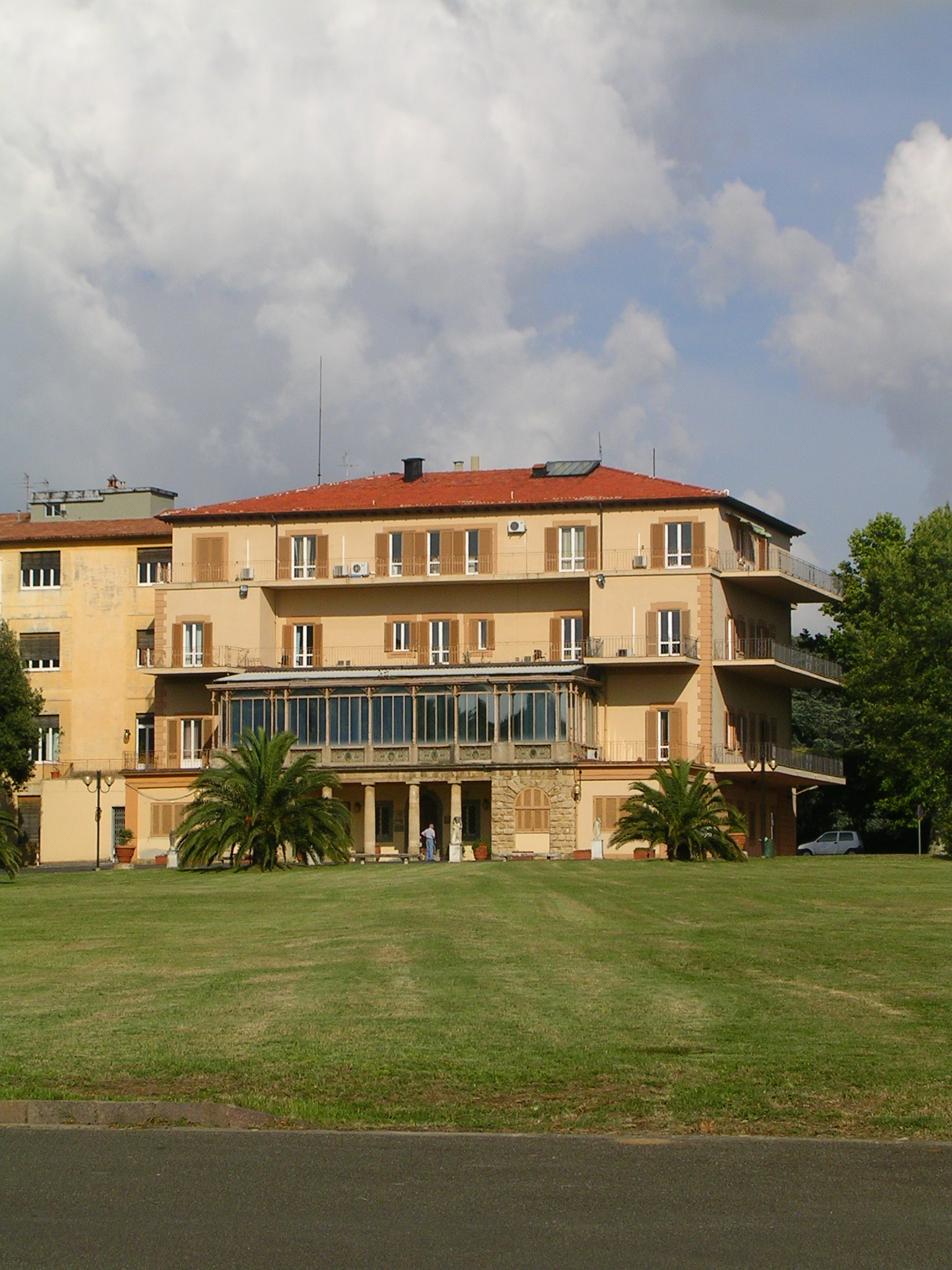 Livorno: il Villa Rodocanacchi dopo le recenti trasformazioni che hanno cancellato gran parte della villa storica.